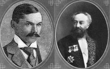 Frederik van Eeden and Marquis d'Hervey de Saint Denys, pioneers of lucid dreaming.